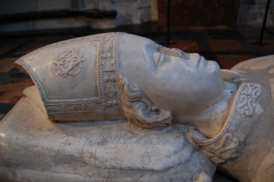 Sepulcro del cardenal Gil Álvarez de Albornoz en la capilla de San Ildefonso, catedral de Toledo (España).